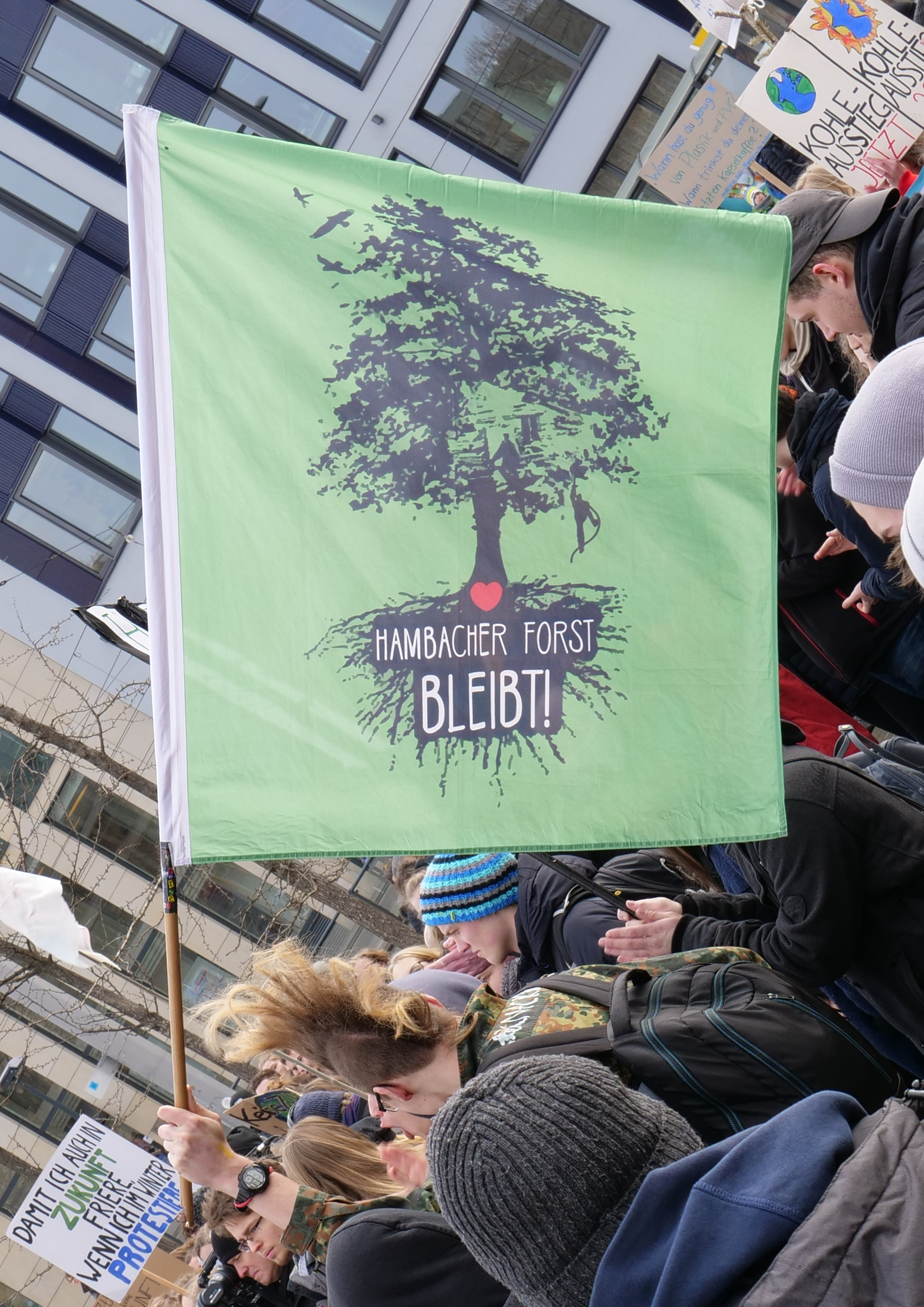 FridaysForFuture Demonstration am 8. Februar 2019 im Invalidenpark in Berlin.